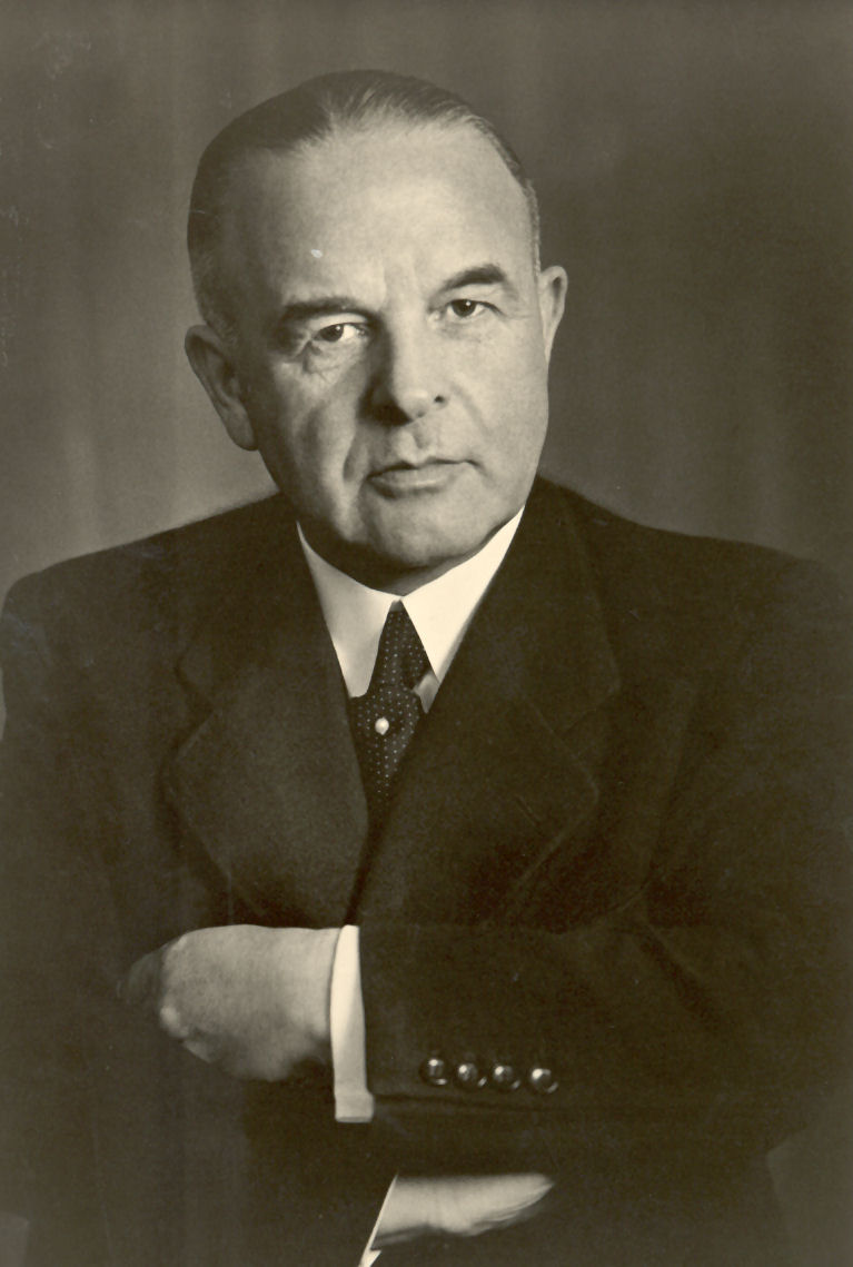 Walter Wiederhold (1885-1959), Lackfabrikant in Hilden